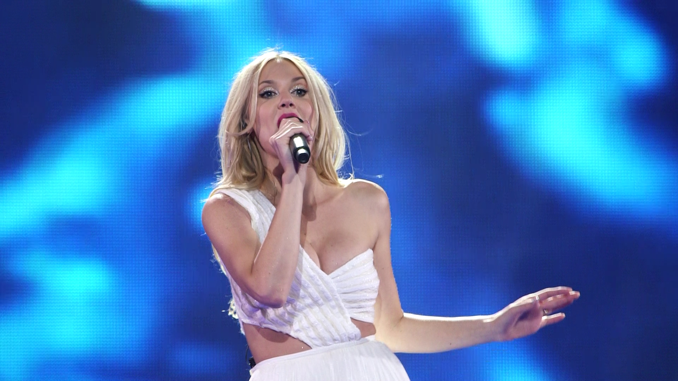 Polska piosenkarka Kasia Moś podczas prób do występu w Konkursie Piosenki Eurowizji 2017.